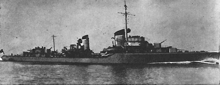 Niemiecki niszczyciel "Leberecht Maass".